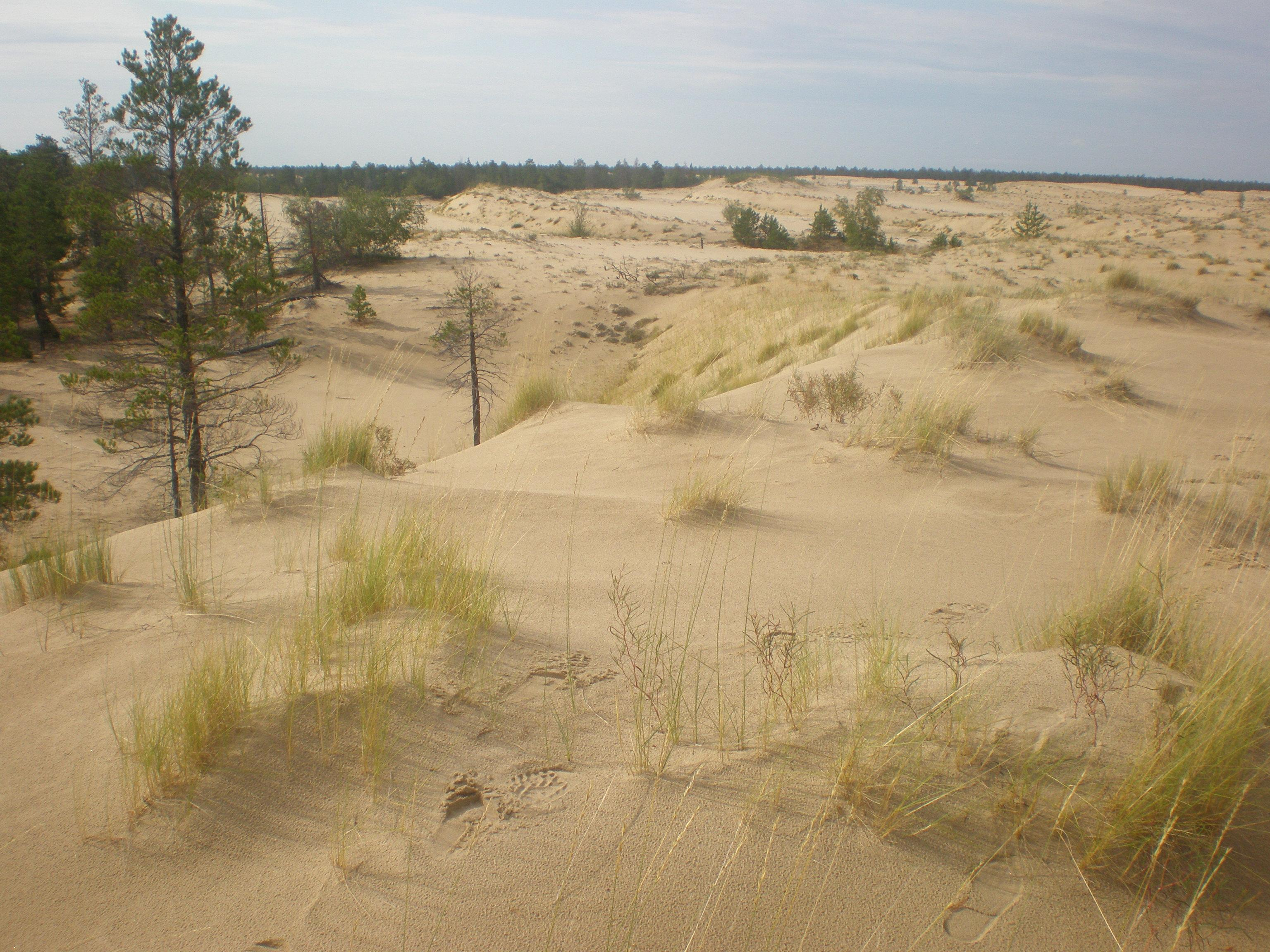 тукуланы